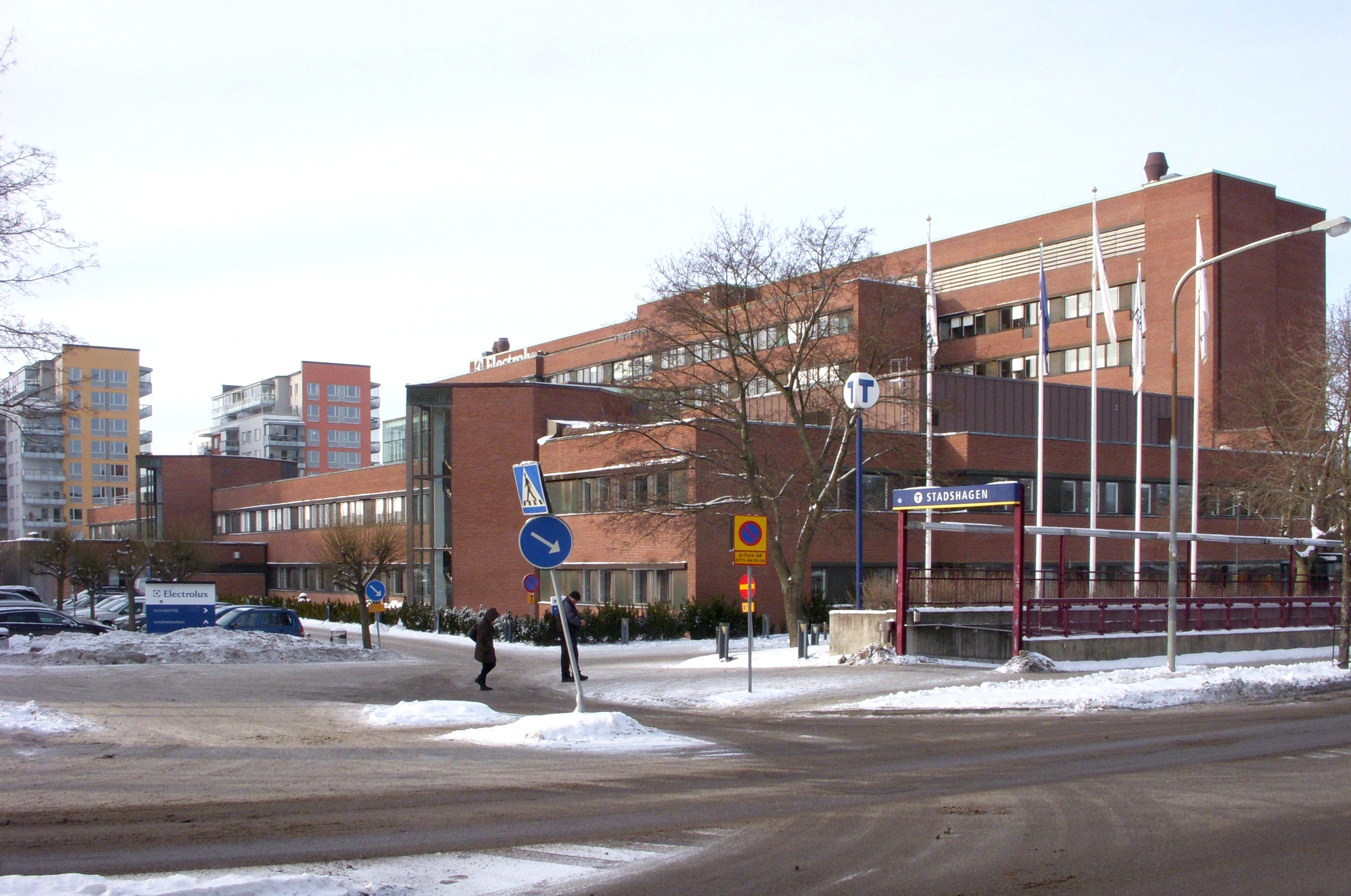 Electrolux huvudkontor i Stadshagen, Stockholm